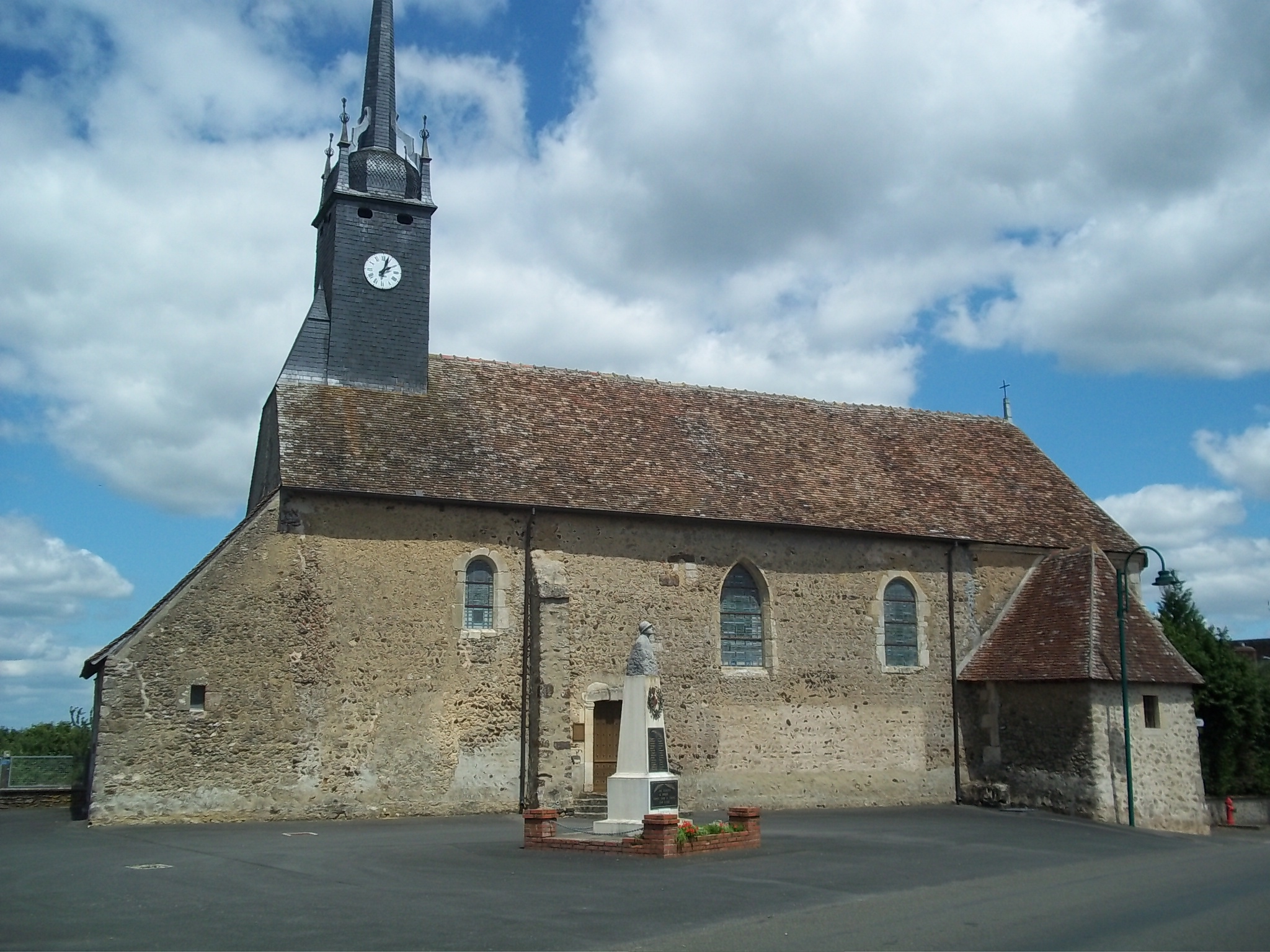 Bouër - Sarthe - l'Eglise